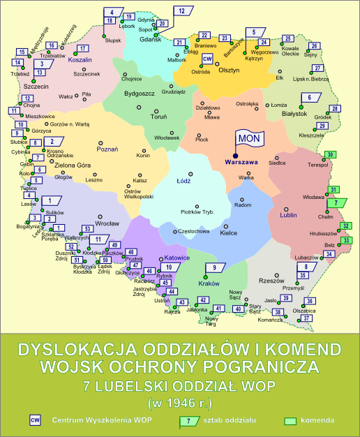 Dyslokacja oddziałów i komend Wojsk Ochrony Pogranicza w październiku 1946 r. - 7 Lubelski Oddział WOP